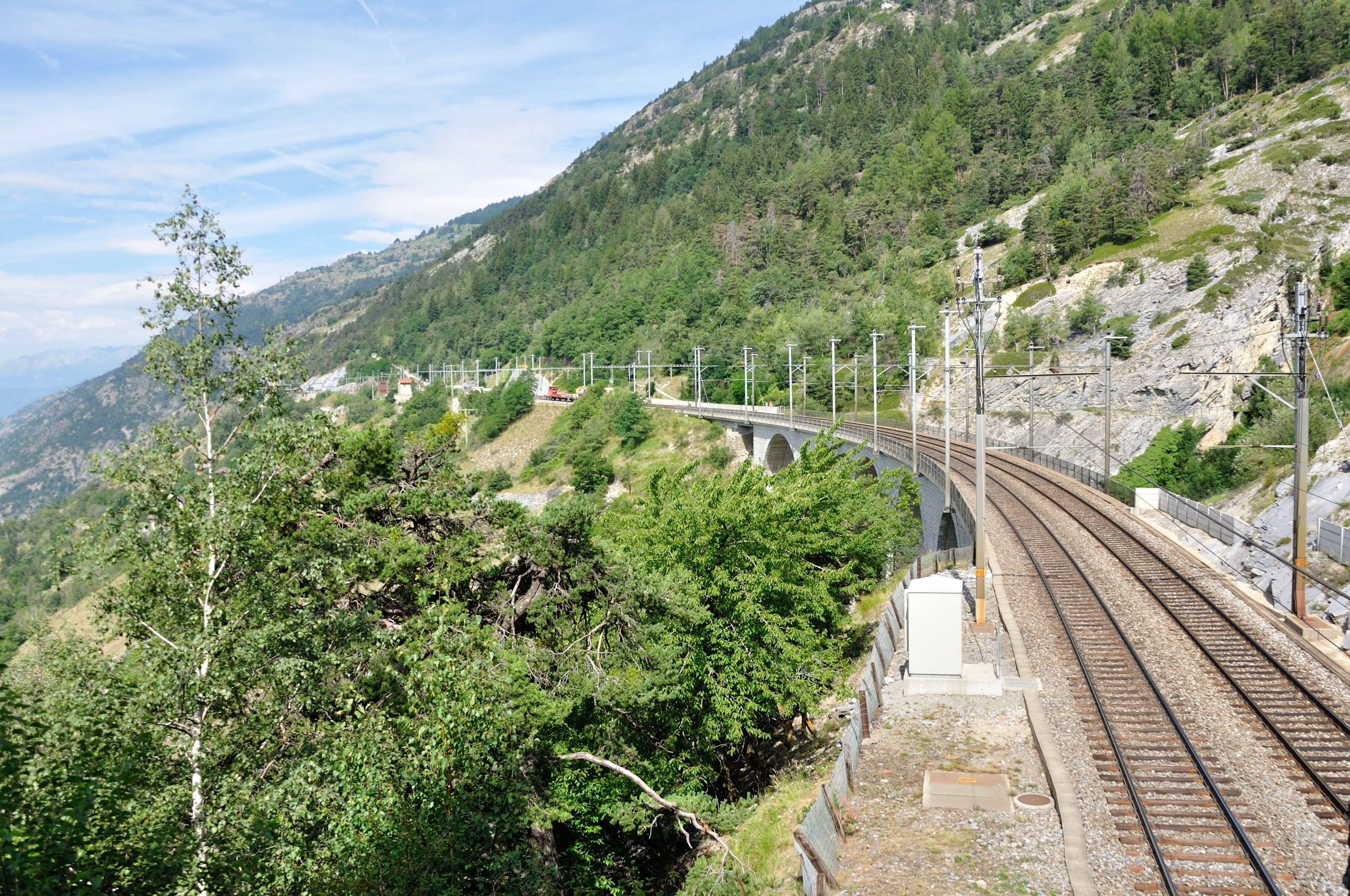 Switzerland, Valais, hike on Lötschberg Südrampe